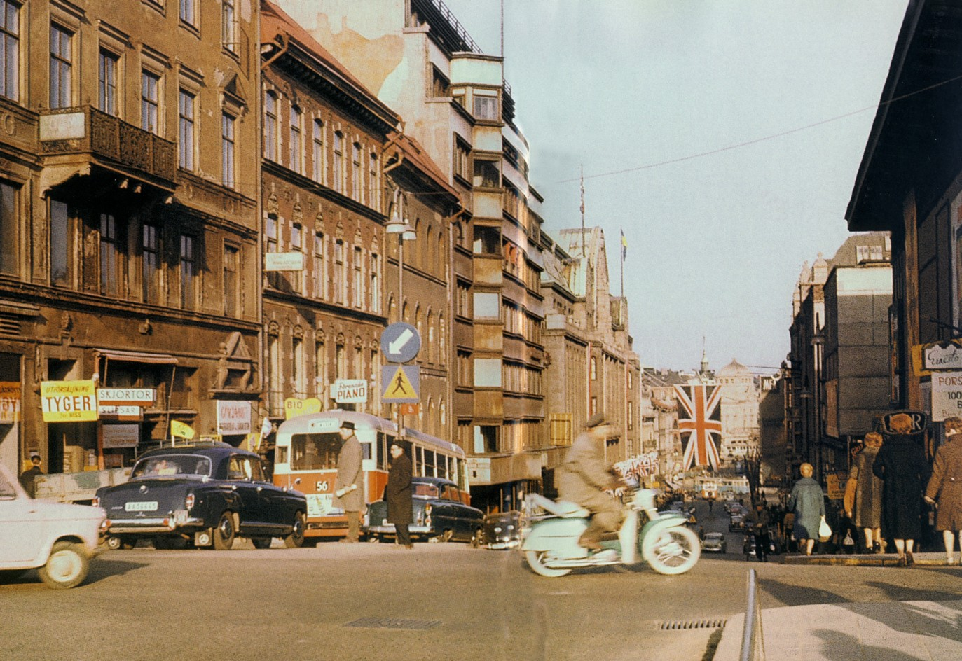 Hamngatan i Stockholm före ombyggnaden